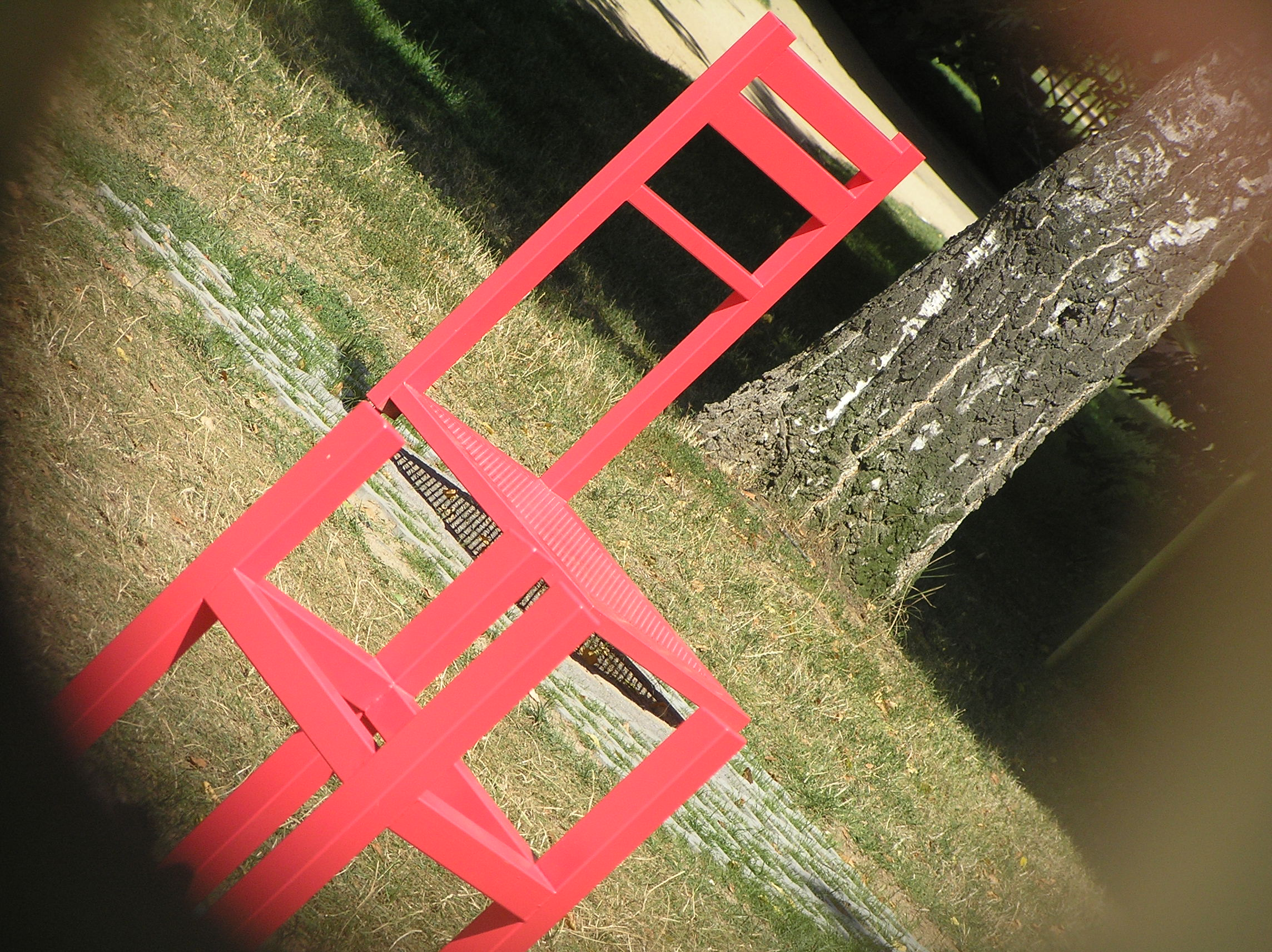 Beuchet-Stuhl, Teil des Optikparcours in Wetzlar. Der "Stuhl" besteht aus drei verschiedenen Elementen, die jeweils einige Meter Abstand haben. Betrachtet man ihn durch das kleine Rohr am Ende, so erscheint er als ein vollständiger Stuhl. Dieses Bild zeigt die optische Täuschung des zusammengesetzten Stuhles.